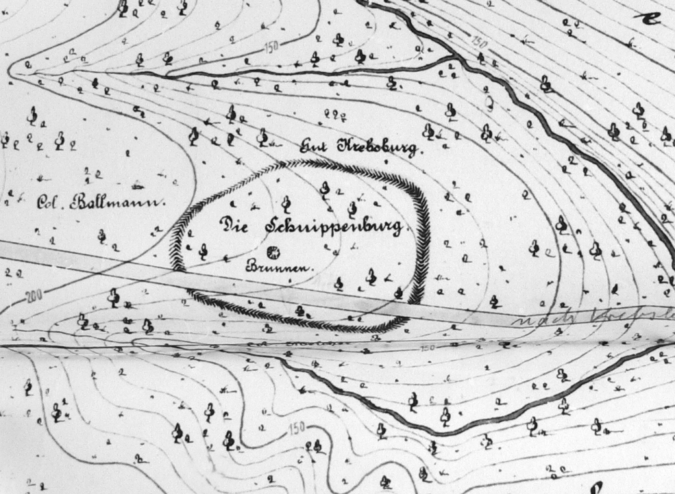 Schnippenburg